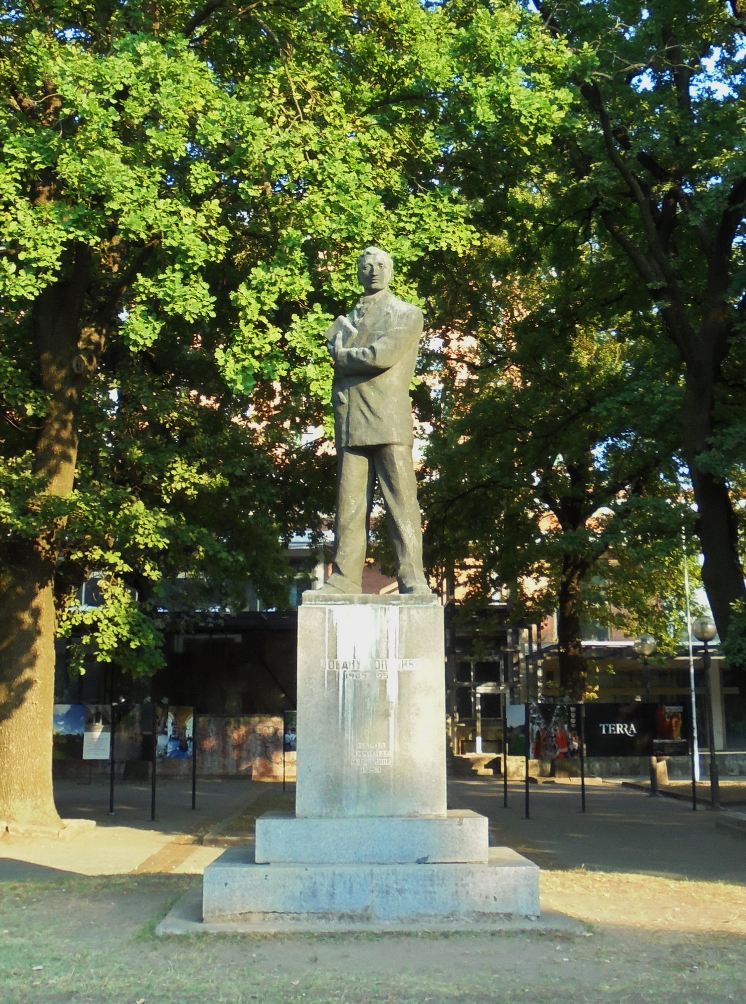 Srpski (latinica): Spomenik Jovanu Popoviću u centru Kikinde, podignut 1950. godine, rad akademskog vajara Aleksandra Zarina.